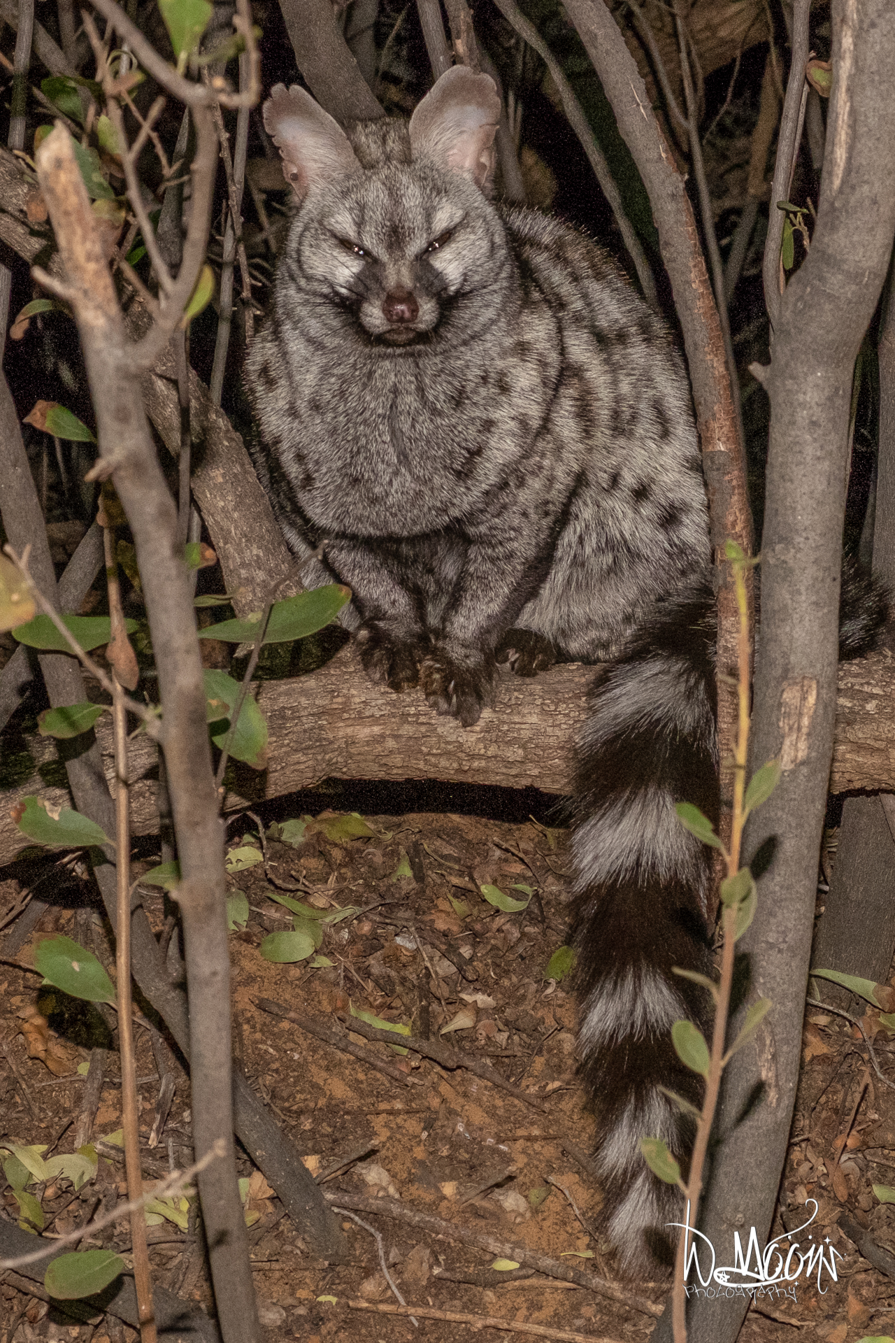 Genet kat in Witsand nature reserve - Zuid Afrika